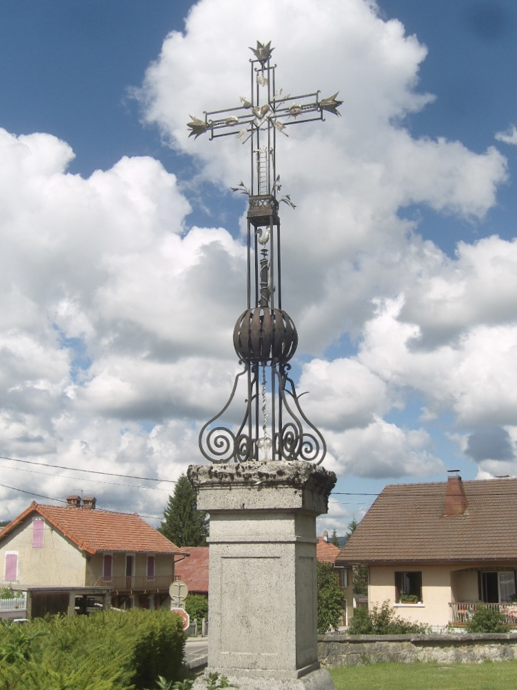 Rochejean, croix de mission dans l'ancien cimetière autour de l'église Saint-Jean-Baptiste